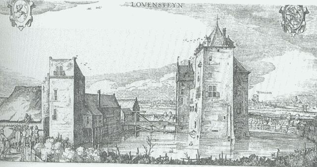 Slot Loevestein in 1621